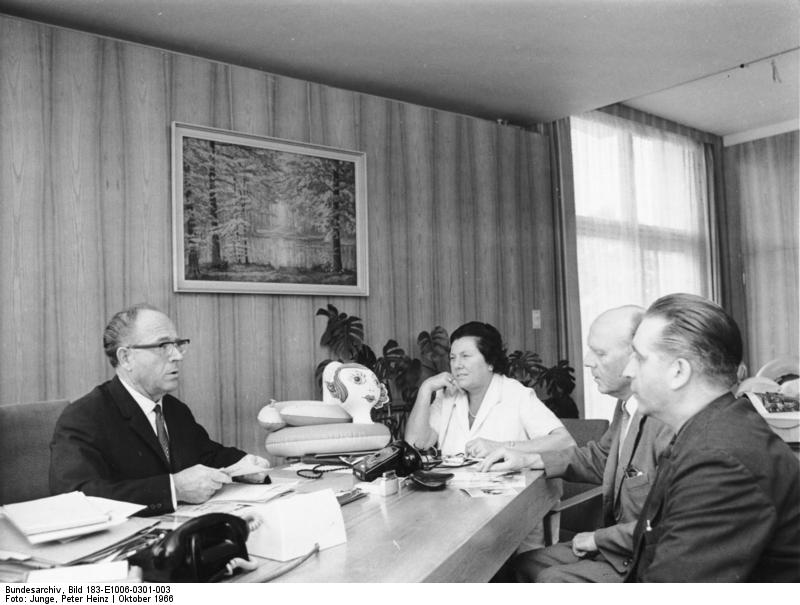 Dresden, halbstaatlicher Betrieb Plastolit Zentralbild/Junge, 14.10.66 DDR: "Plastolit" in Dresden-Radebeul - bedeutender halbstaatlicher Betrieb - Exporteur von Wasserspielzeug Der 1950 mit 18 Angestellten als privates Unternehmen geschaffenen Betrieb für Kunststoff-Verarbeitung "Plastolit" (Horst Meyer) in Dresden-Radebeul, stellte als erster Betrieb in der DDR Kinderspielbälle aus Plaste für den Inlandbedarf her. 1960 nahm der Betrieb die staatliche Beteiligung auf und führte erstmalig in der DDR das Hochfrequenzschweißen von Kunststoffen auf PVC-Folienbasis ein. "Plastolit" arbeitet heute mit 200 Beschäftigten vorwiegend für den Export. 90% der Wasserspielwaren (Bälle, Wassertiere jeder Art, Schwimmatratzen, aufblasbare Bäder und Wannen für Kinder) werden in 83 Länder exportiert. Der auf vielen Messen und Ausstellungen vertretene halbstaatliche Betrieb der DDR bietet unter den europäischen Betrieben seiner Art das umfangreichste Sortiment an Wasserspielwaren an, die von der Firma selbst entwickelt werden. Bis 1970 ist die Steigerung der Produktion von Wasserspielwaren um 40% vorgesehen. UBz: Komplementär Horst Meyer, links, bei einer der täglich stattfindenen Arbeitsberatungen mit leitenden Mitarbeitern seines Betriebes.